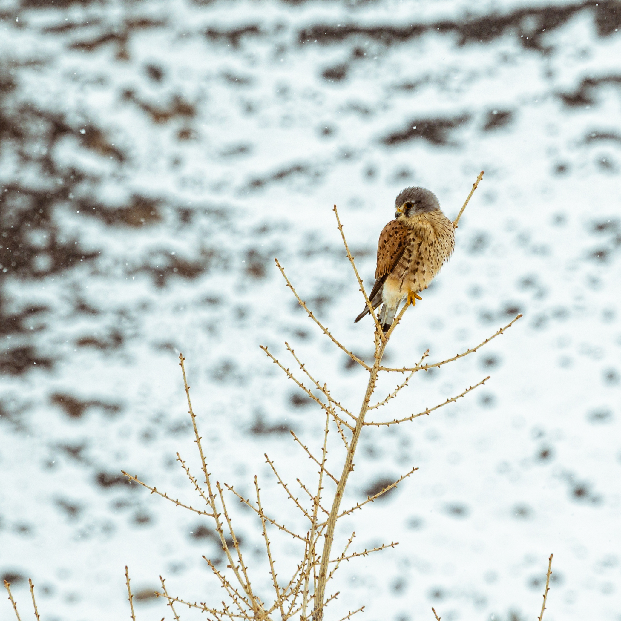 Photo prise en mai 2017 lors d'une randonnée depuis le torrent du Rif